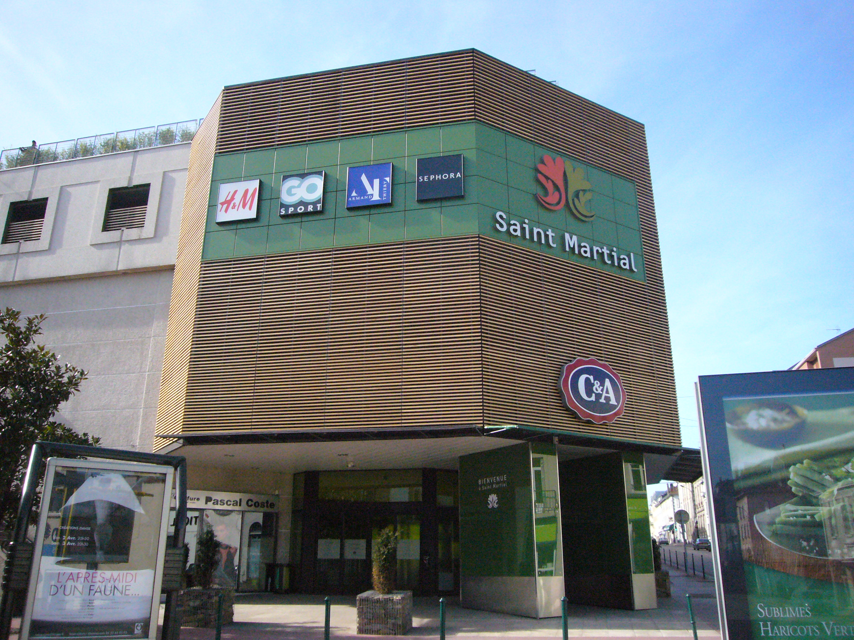 Entrée sud du centre commercial Saint-Martial de Limoges (Haute-Vienne, France)